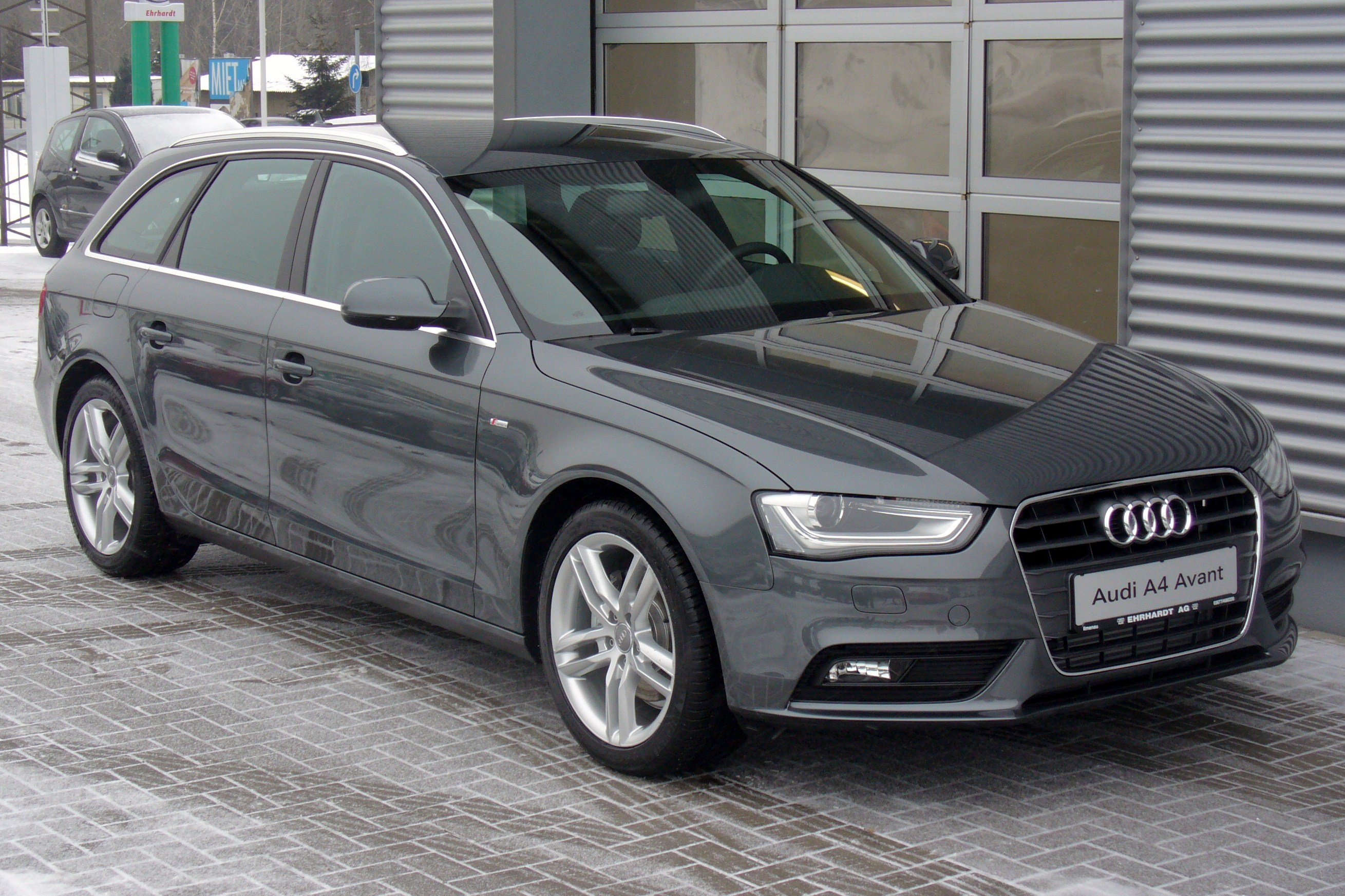 Audi A4 Avant